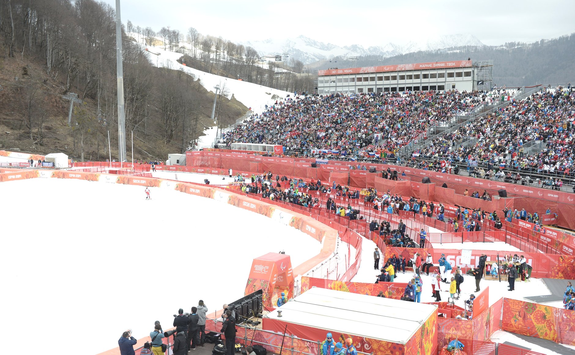 The 2014 Winter Paralympics in Sochi. Super giant slalom event at the Rosa Khutor Alpine Ski Resort. Finish area